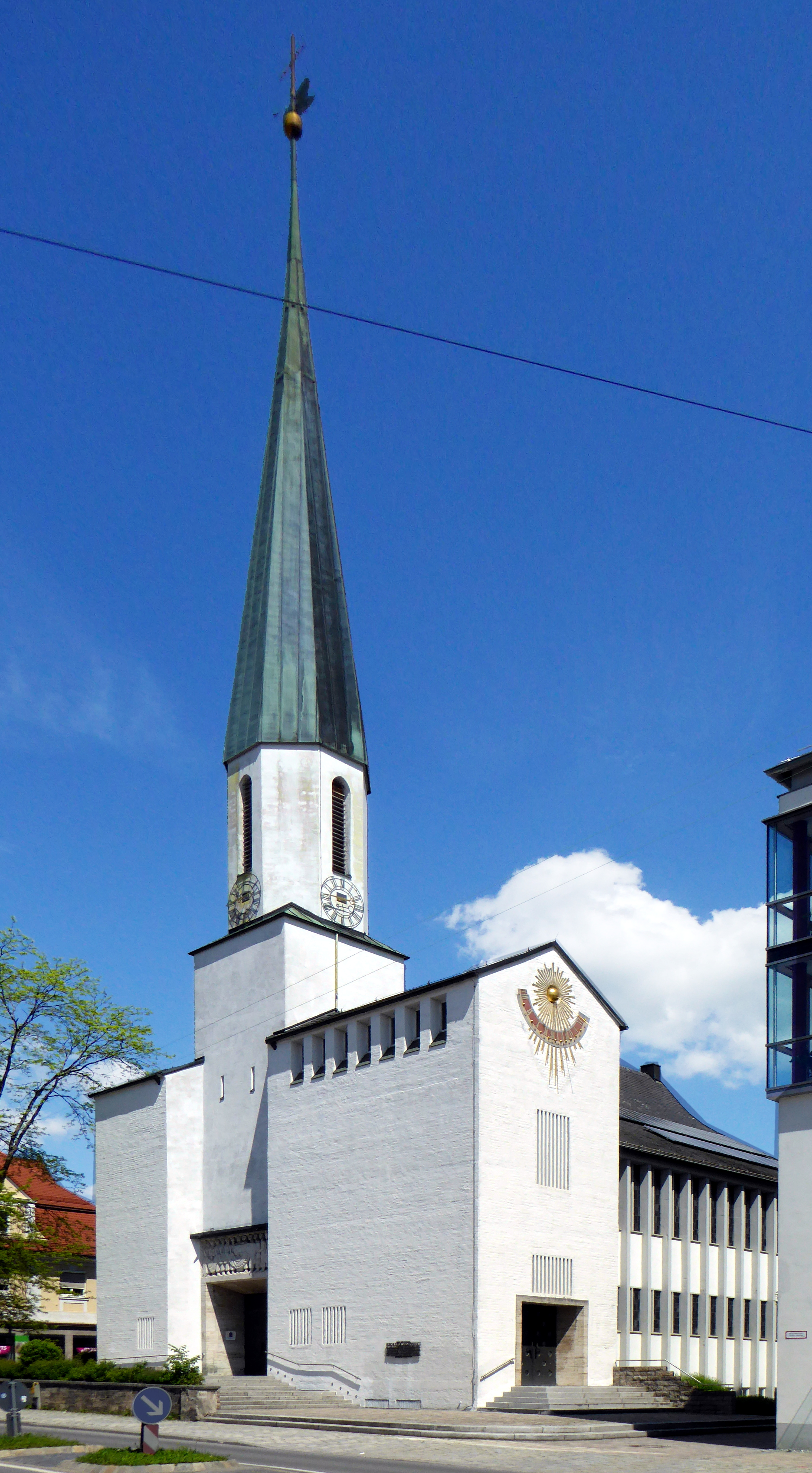 Süd- und Westseite der Apostelkirche in Weilheim (Oberbayern).